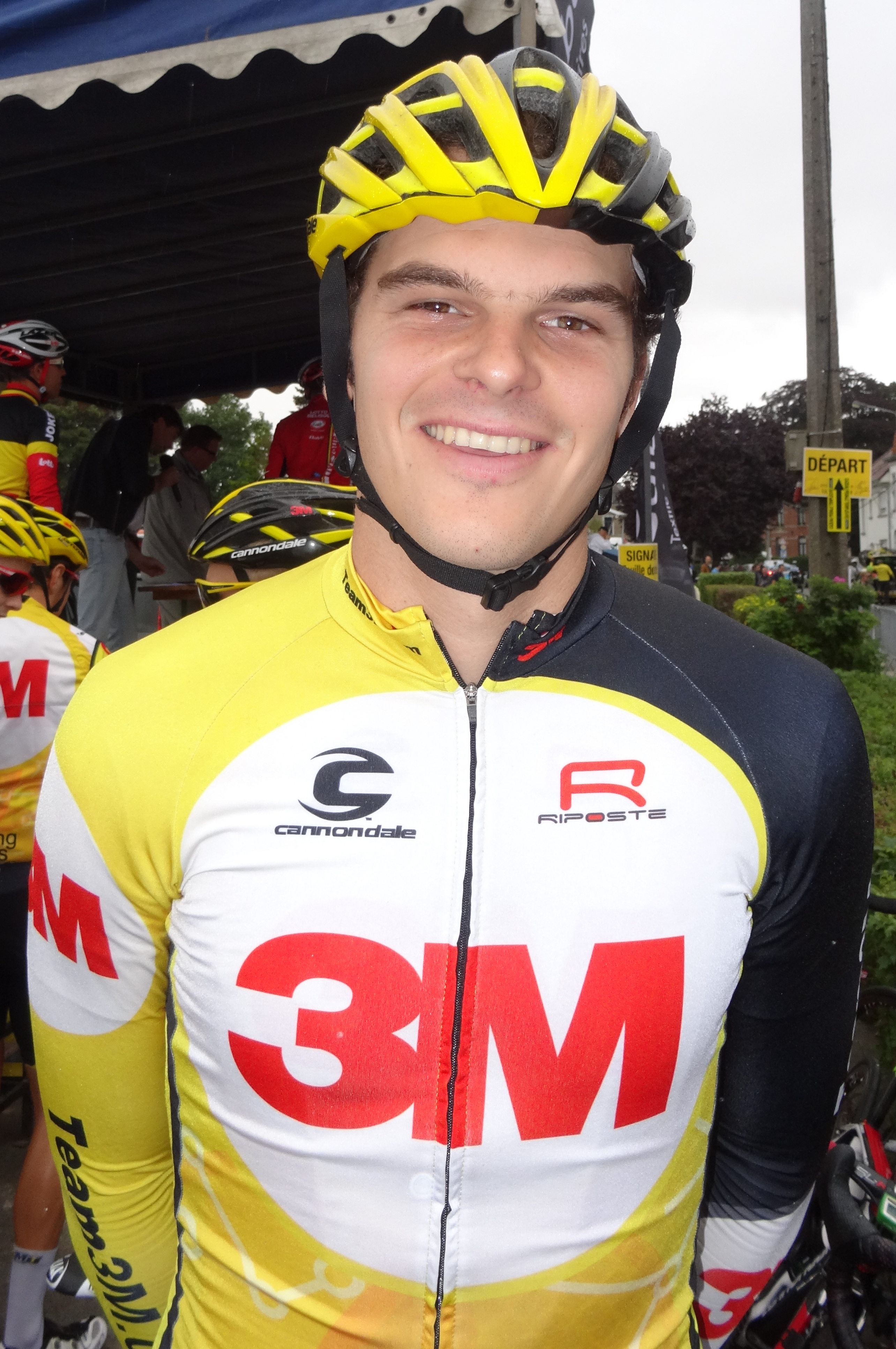 Reportage photographique réalisé le samedi 30 août à l'occasion du départ et de l'arrivée du Grand Prix des commerçants de Templeuve 2014 à Templeuve (Tournai), Belgique.